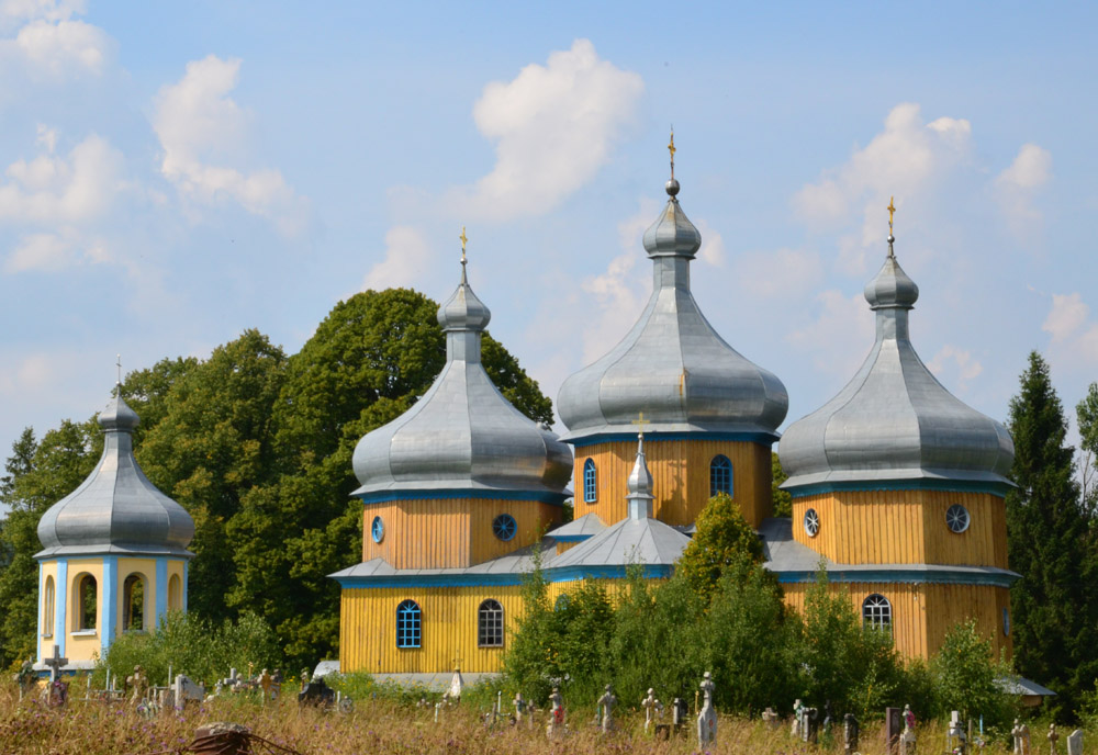 Церква Святого архангела Михаїла (1914), с.Боберка